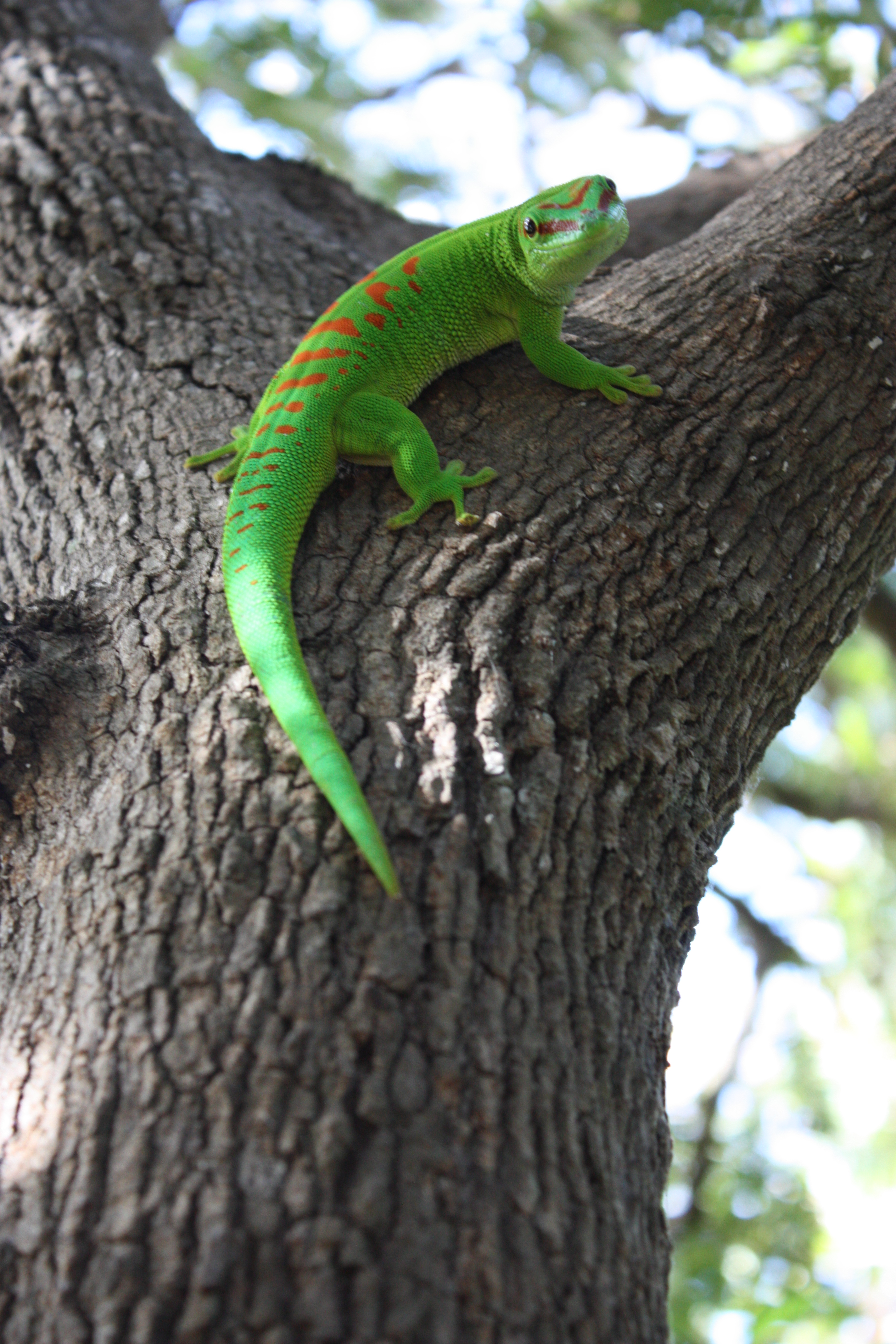 Phelsuma madagascariensis grandis, between Diego Suarez and Ankarana, N Madagascar